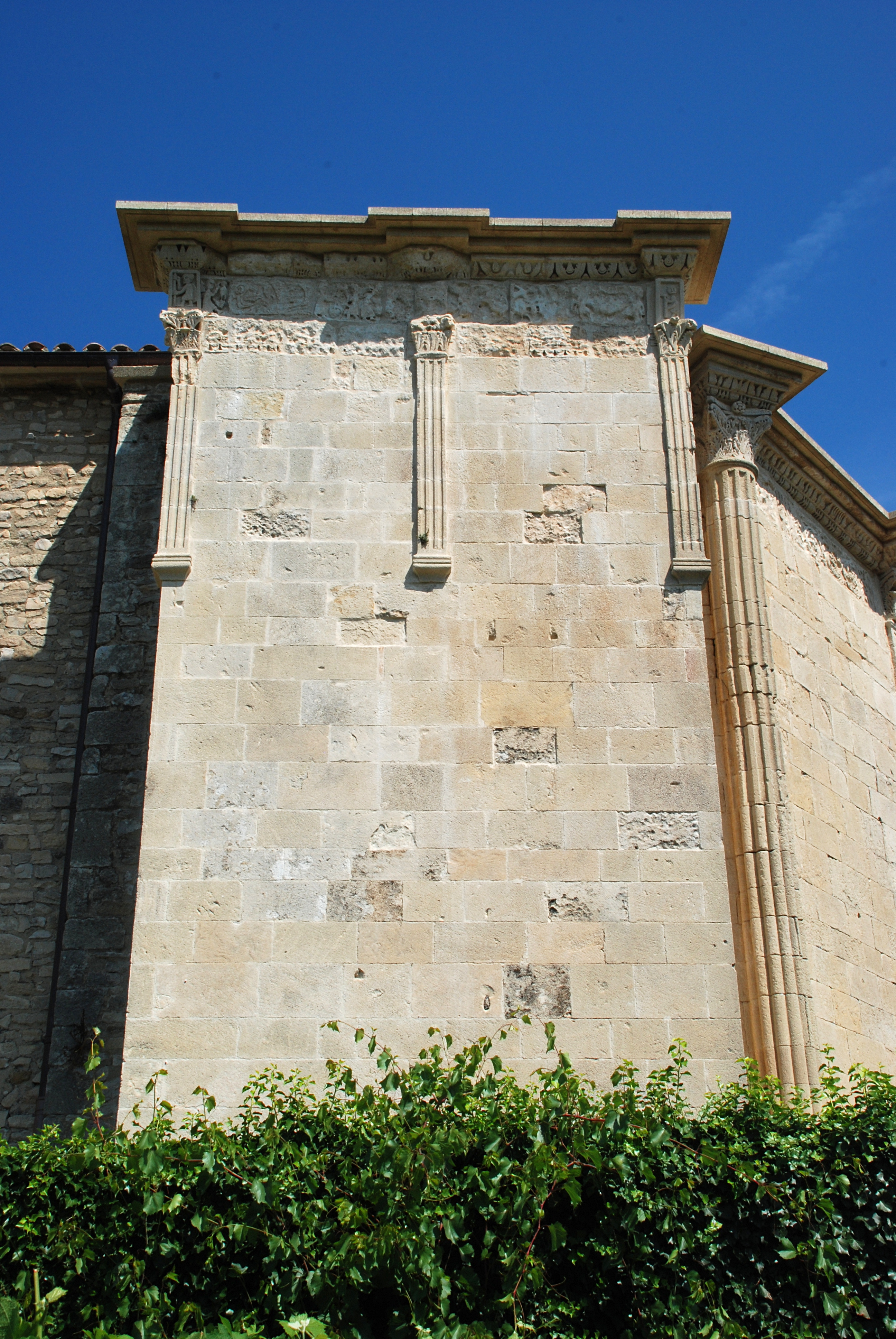 France - Provence - Vaucluse - Vaison-la-romaine - chapelle Saint-Quenin (art roman provençal) : la travée de choeur